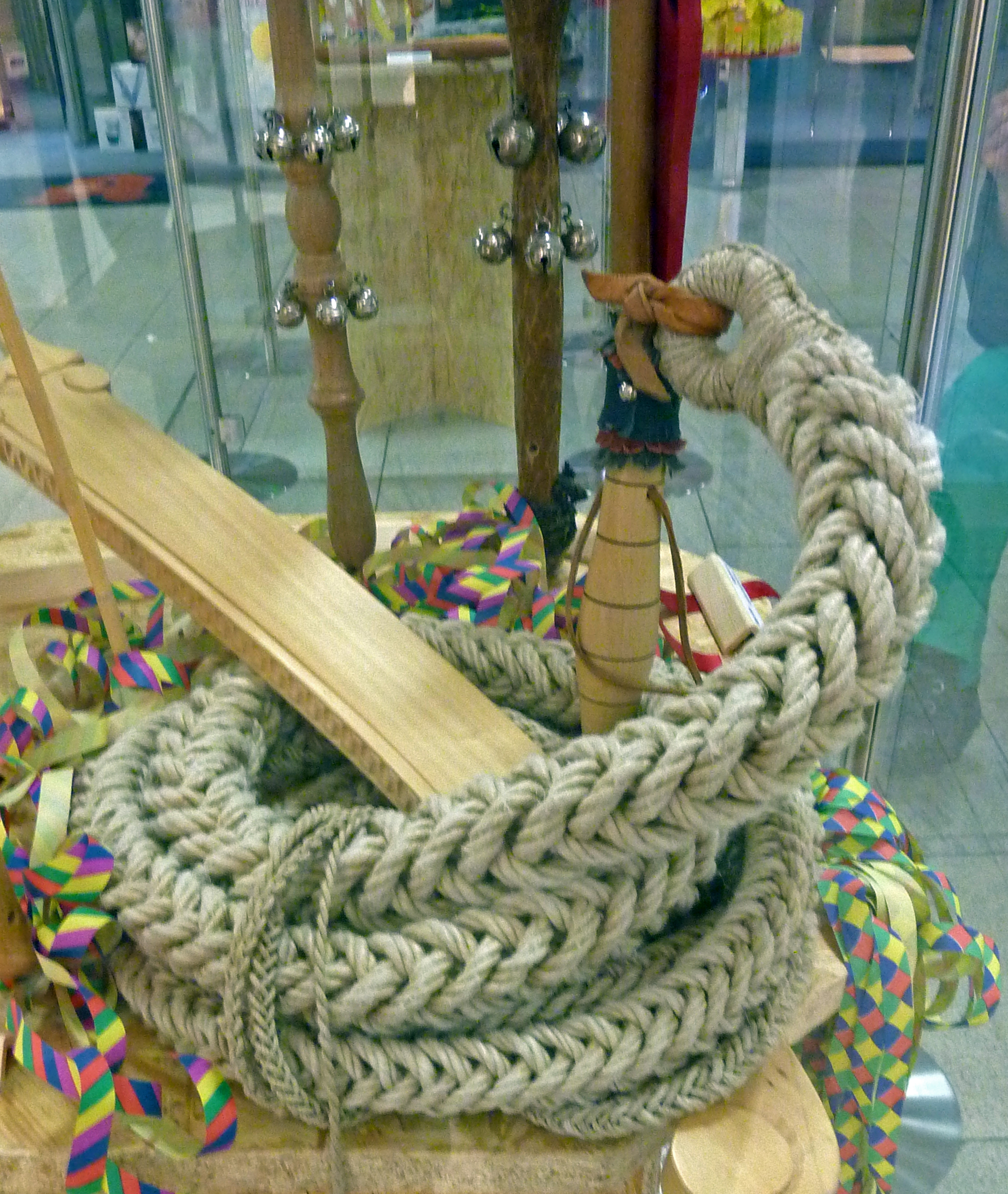 Karbatsche - Häsrequisit oder Narrenutensil der Hänseler, einer Häsfigur der Historischen Narrenzunft Markdorf e.V. Exponat aus der Sammlung Peter Scharte aus der Ortenau, vom 14. Januar bis 13. Februar 2013 im Einkaufszentrum Schwarzwald City (Freiburg) unter dem Titel „Narrenrequisiten - vielfältig und kreativ“ ausgestellt.